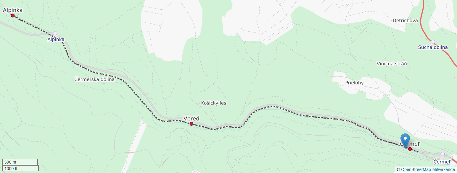 Košická detská historická železnica (OpenStreetMap)